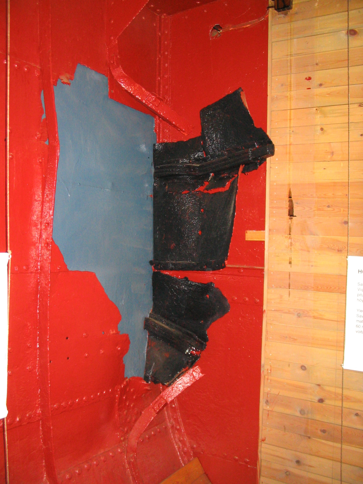 Kuunari Salaman upottanut puskujälki, "Murhahaava", aluksen kyljessä museoinnin yhteydessä umpeen levytettynä